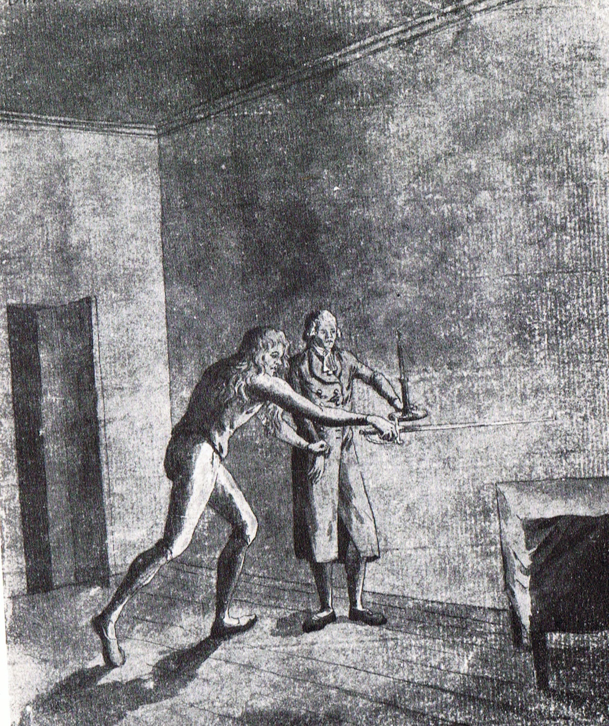 Szene aus Schillers "Die Räuber", Franz und Daniel, 18. Juni 1899, Aquarell, 23,7 x 18,8 cm